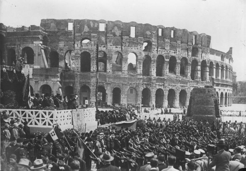 Der italienische Diktator Mussolini spricht vor dem alten Collosseum in Rom zur faszistischen Jugend seines Landes. Mussolini auf der Tribüne (links im Bilde) vor dem Collosseum in Rom beim Vorbeimarsch der faszistischen Jugendverbände. Information added by Wikimedia users.* Benito Mussolini saluta una parata della "Gioventù fascista" di fronte al Colosseo, nel 1931. Sulla destra si nota la "Meta sudans", fontana romana demolita da Mussolini.